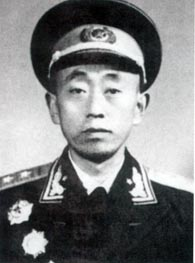 郑维山将军1955年受勋照